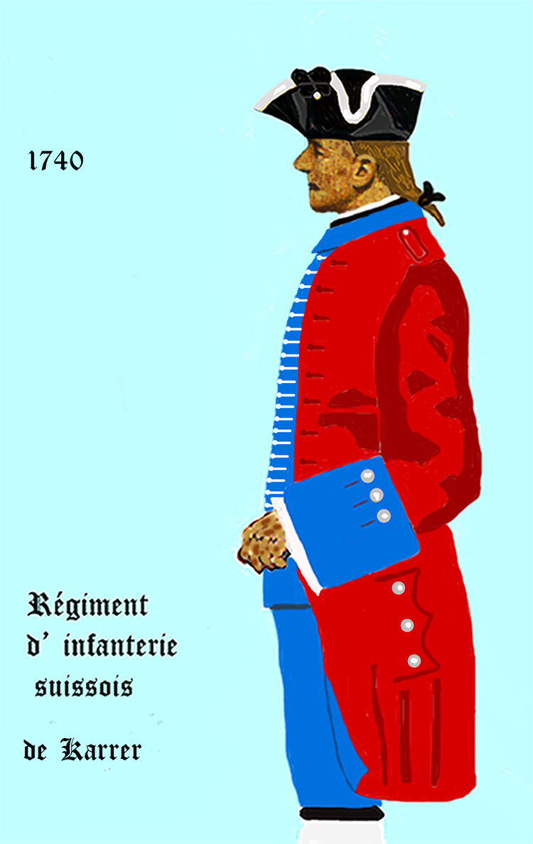 Uniform eines königlich französischen Infanterie-Regiments gemäß Dekret von 1734. - Entnommen und überarbeitet aus: „LES UNIFORMES ET LES DRAPEAUX DE L'ARMÉE DU ROI“ Marseille 1899.